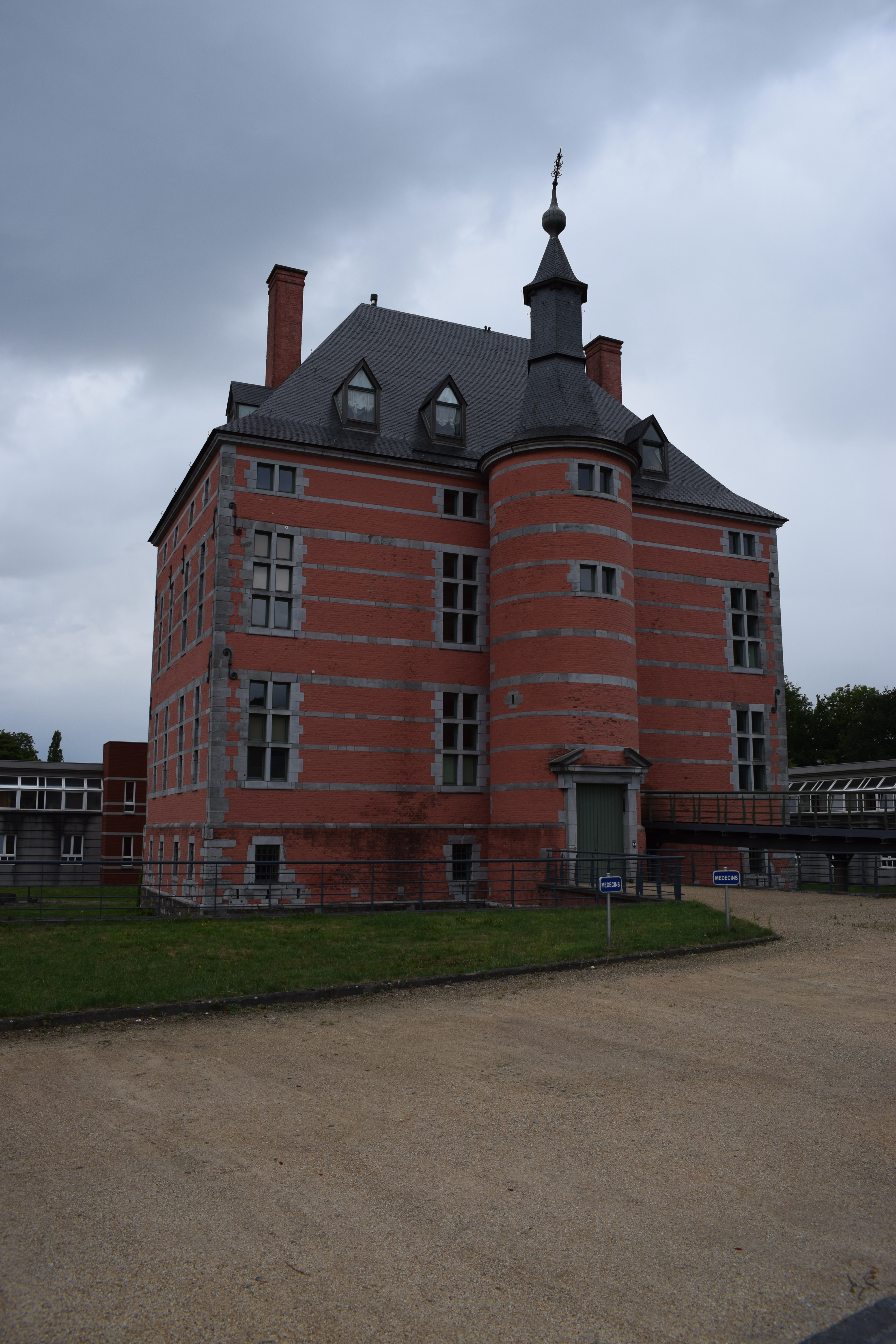 Vue du château de Fayenbois à Jupille-sur-Meuse (dans la commune de Liège, en Belgique).